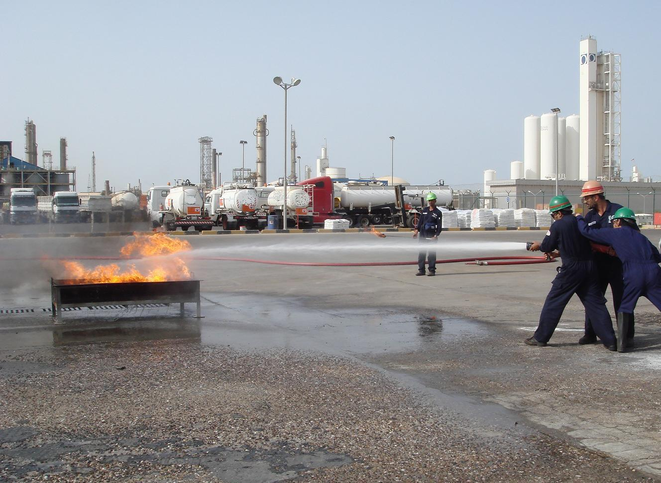 അഗ്നിശമനത്തിനുപയോഗിക്കുന്ന കുഴലിൽ വെള്ളം രണ്ടുതരത്തിൽ ചീറ്റുന്നതിന് സംവിധാനമുണ്ട് : ദൂരെനിന്നും ശക്തിയായി ചീറ്റുന്നതിനും(Cooling), വെള്ളം വിതറിത്തെറിപ്പിക്കുന്നതിനും (spraying). കുവൈറ്റിലെ ഒരു കമ്പനയിൽ അഗ്നിശമന മാർഗങ്ങൾ പരിശീലിപ്പിക്കുന്ന ദൃശ്യമാണിത്.